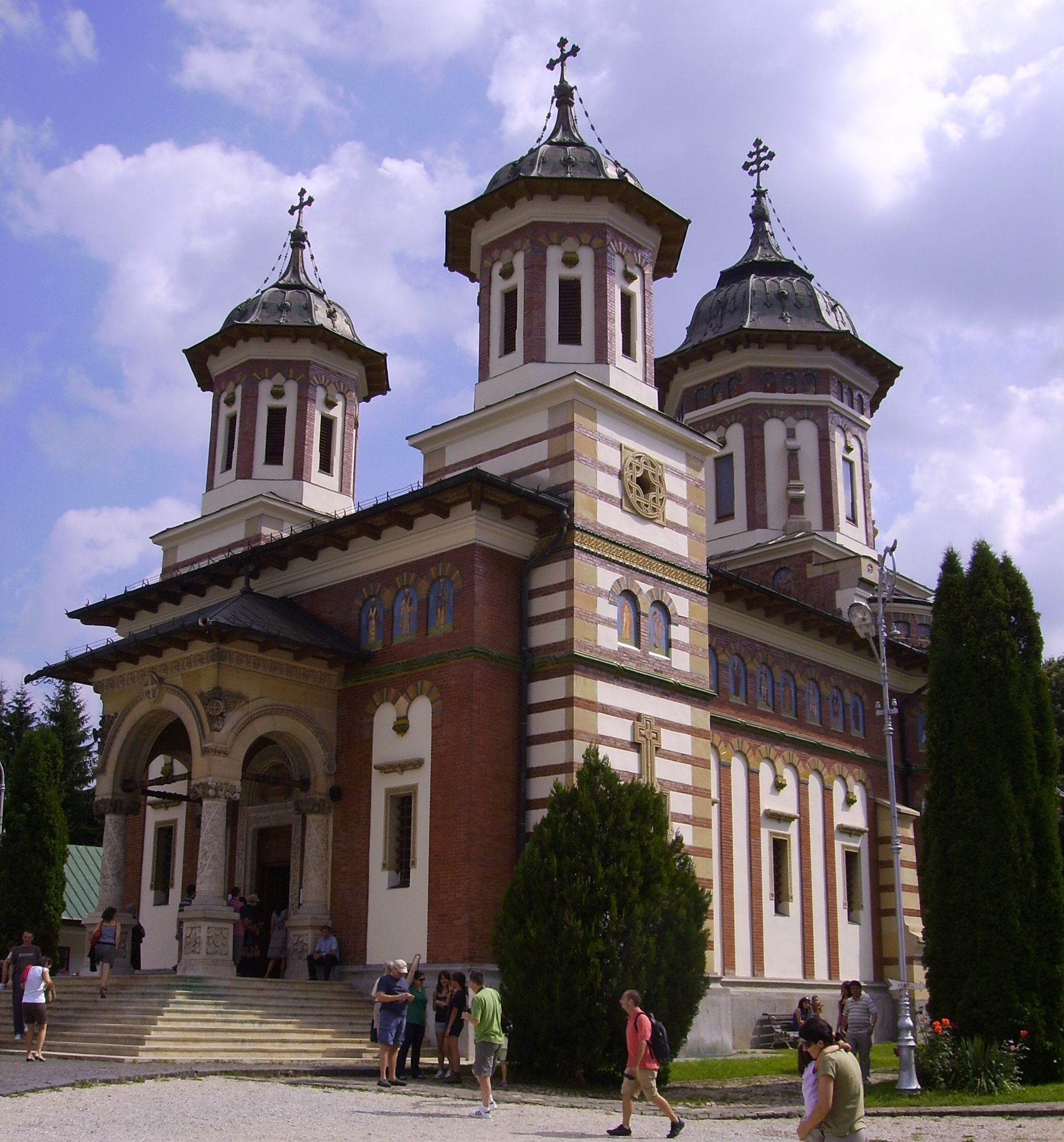 Mănăstirea Sinaia - Biserica "Adormirea Maicii Domnului" 01